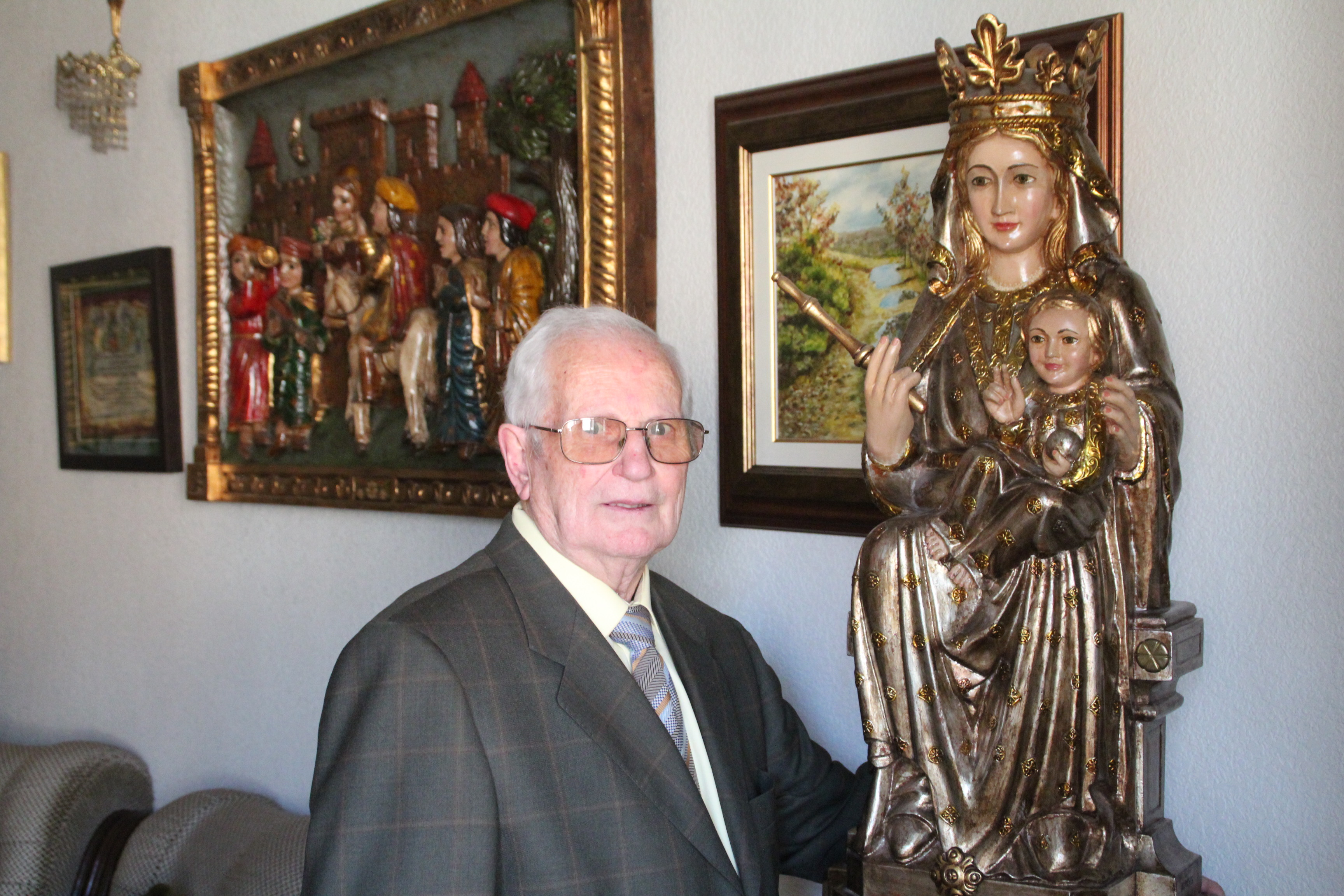 Antonio Reyes mostrando una de sus obras